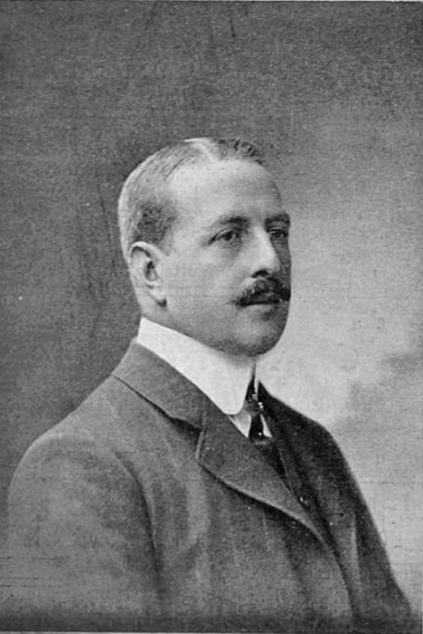 GeneaPortugal